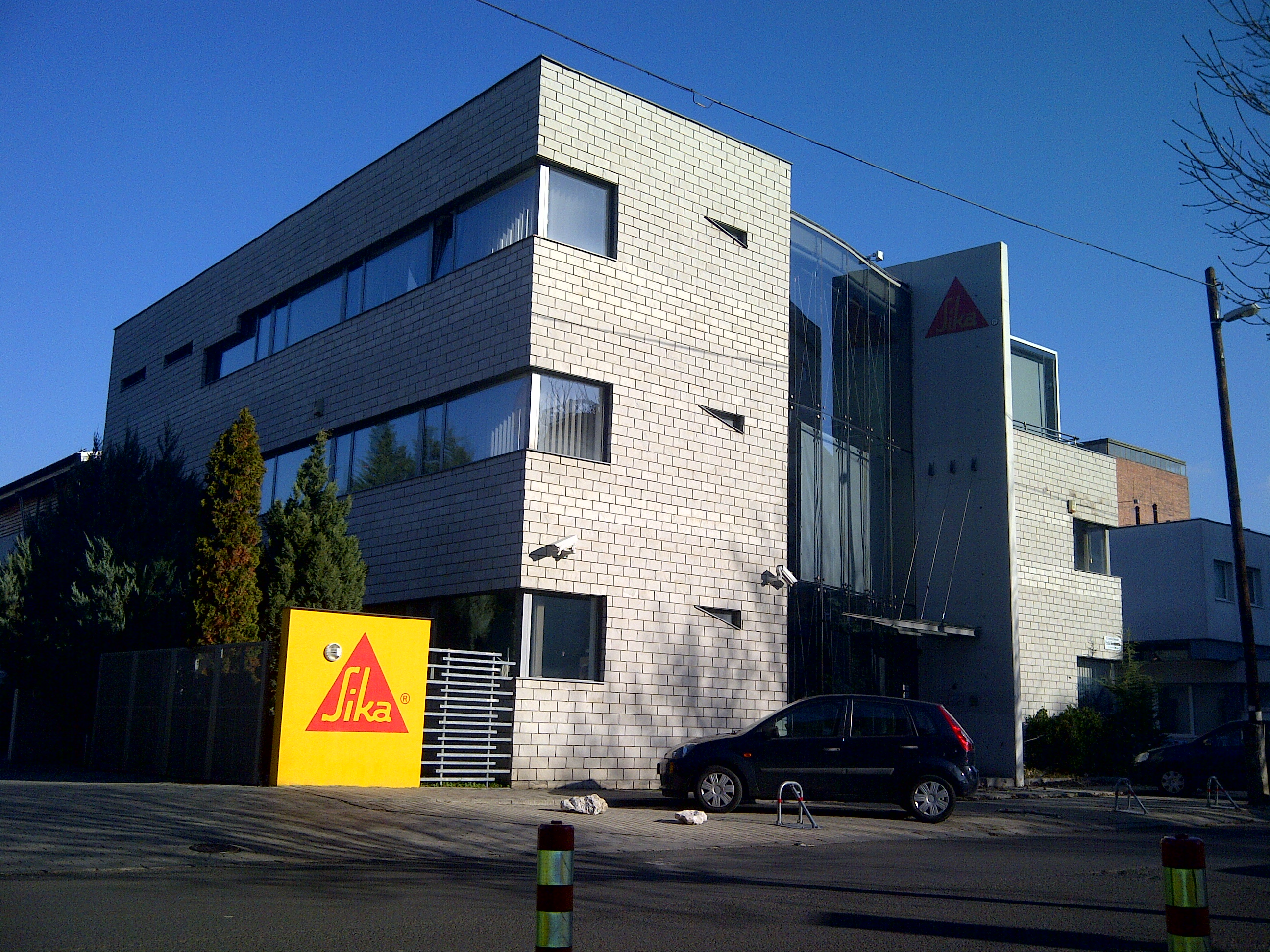 Sika Hungária Kft. székház - Budapest XI, Prielle Kornélia u. 6